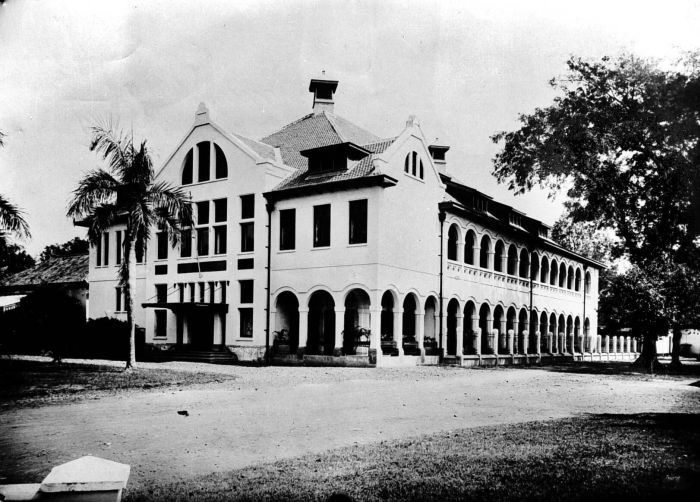 Repronegatief. H.B.S. Het Groote Klooster in Noordwijk, Batavia, Java